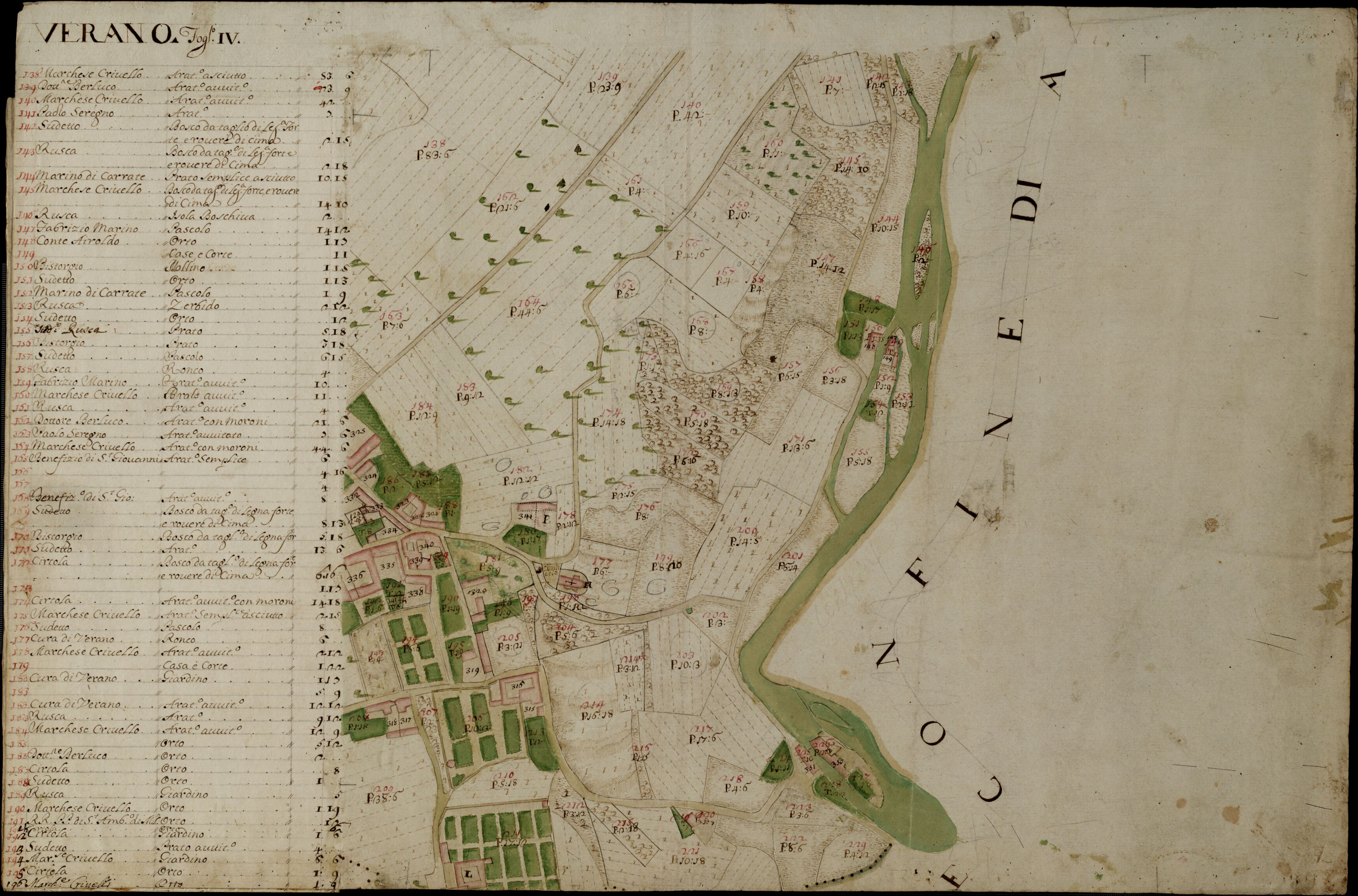 Mappa del Comune Censuario di Verano Brianza nel 1721 (Subfondo Catasto teresiano. Mappe di attivazione)